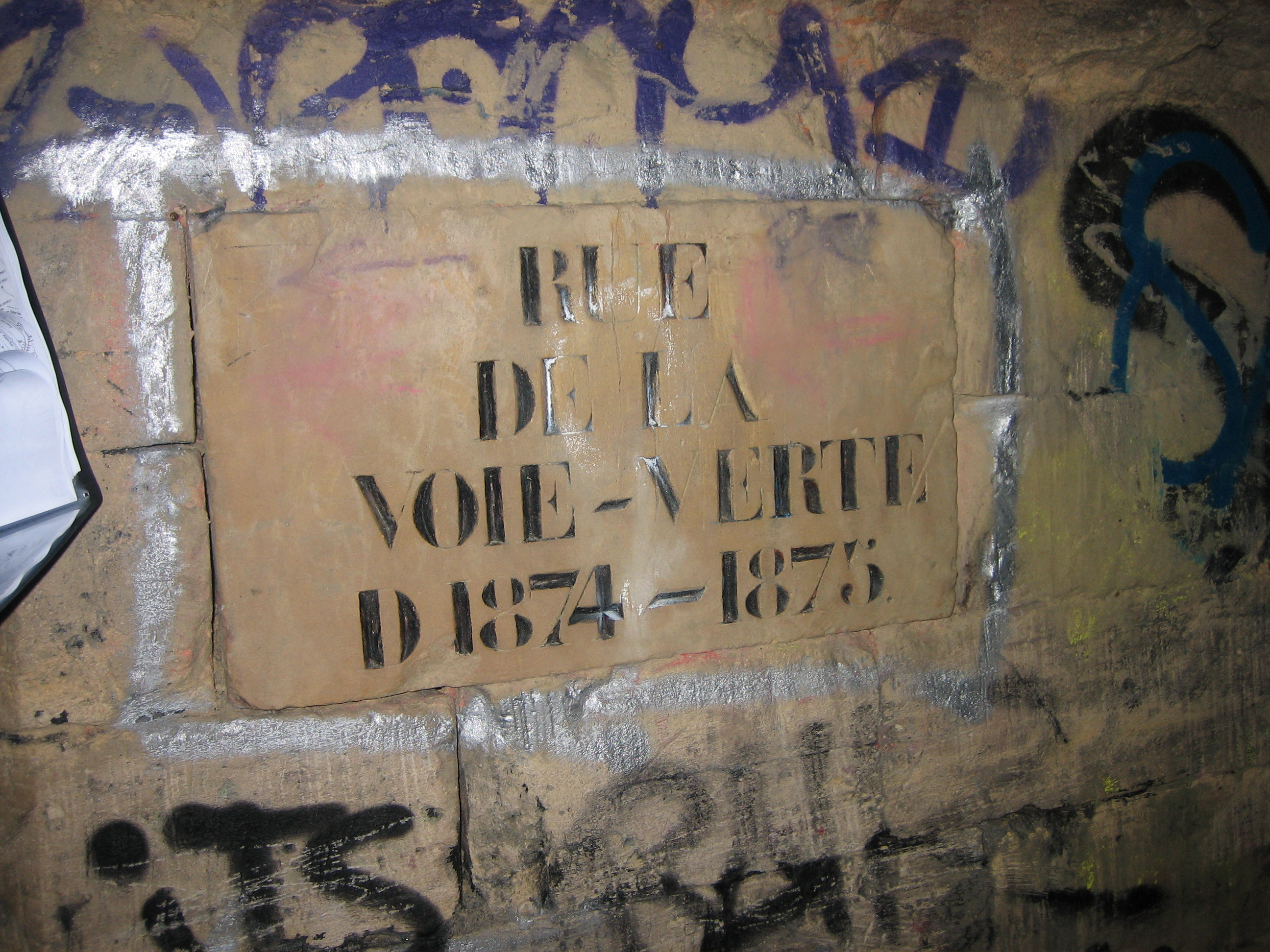 Promenade dans les catacombes de Paris, près du Charlety